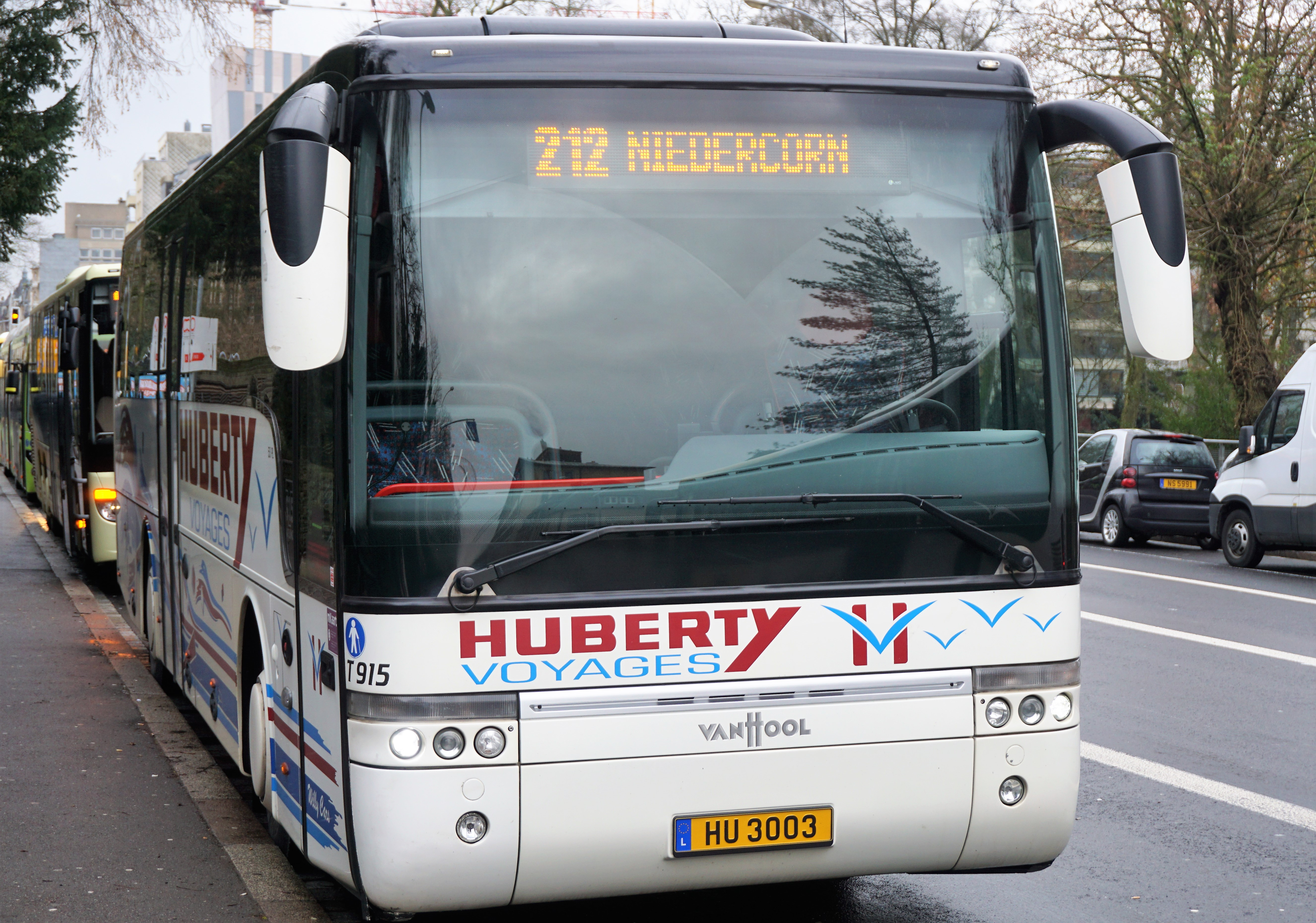 Luxembourg, avenue Monterey arrêt Monterey-Parc, HU3003, Huberty, ligne 212 direction Niedercorn.